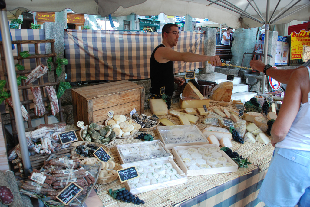 Fromages du Haut-Var à Cotignac